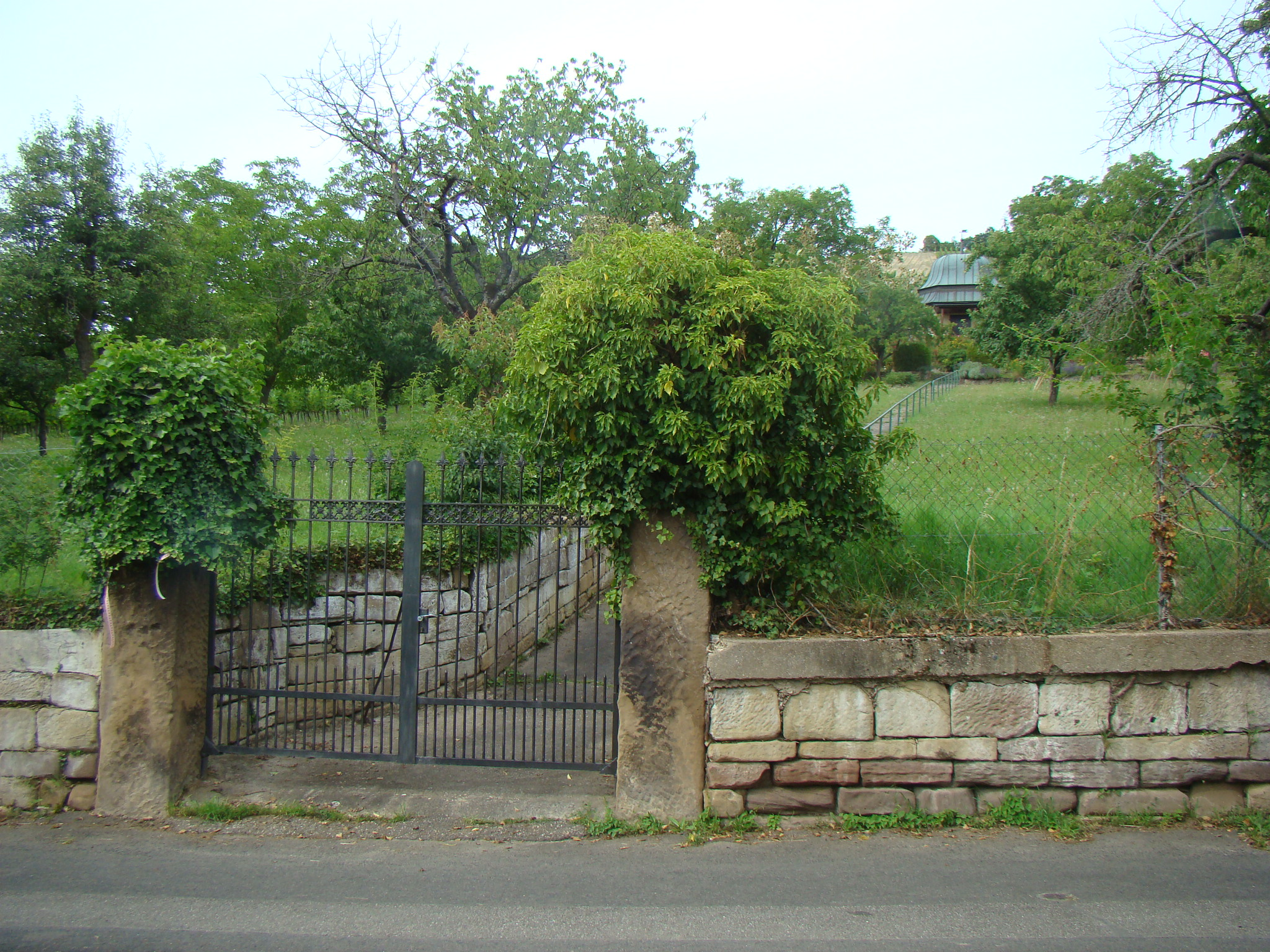 Seniorengarten mit denkmalgeschütztem Gartenbelvedere in Heilbronn